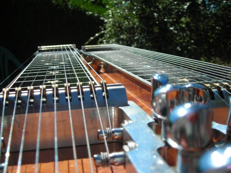 rollernut